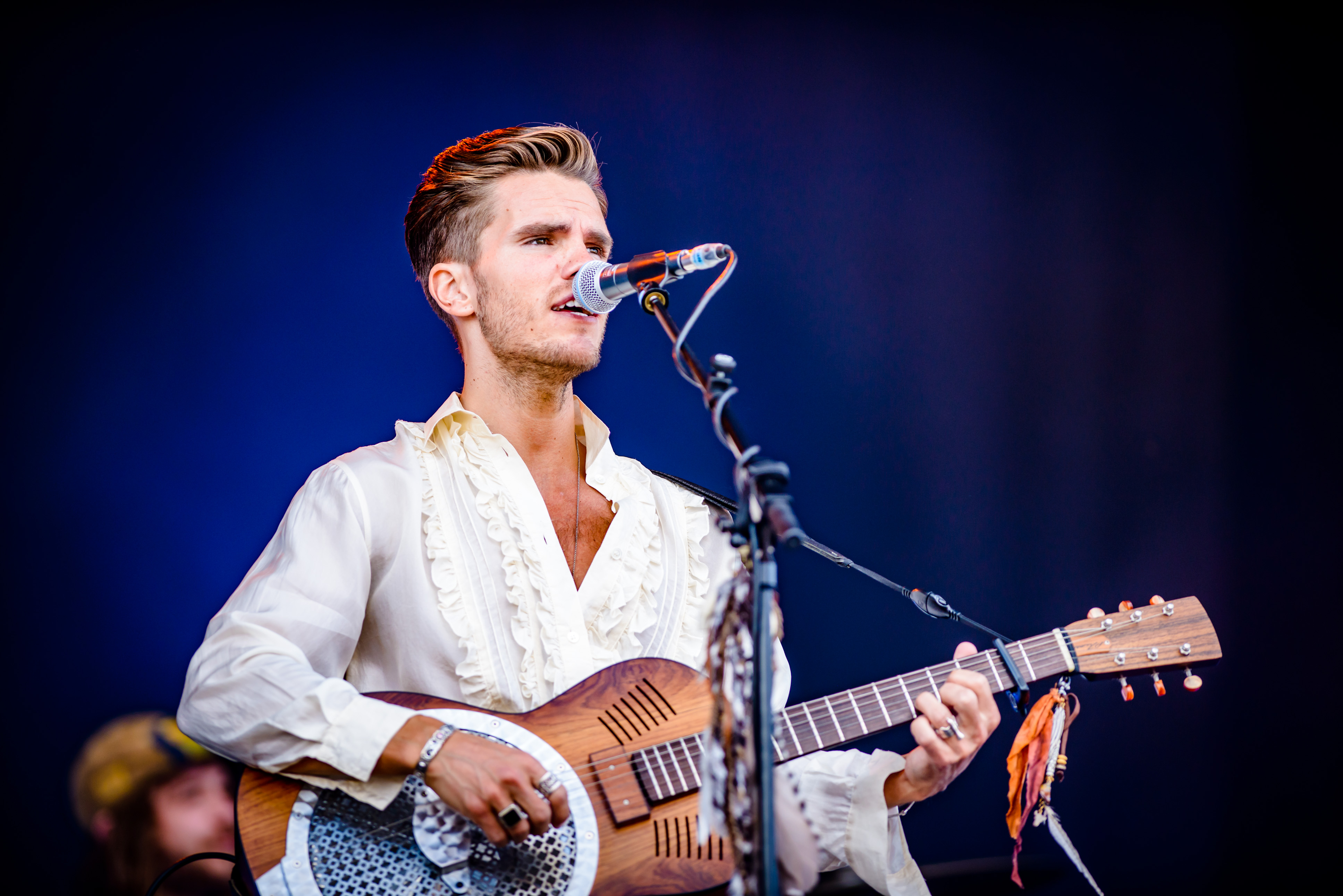 'Rock im Park 2018; Zeppelinfeld Nürnberg': 'Kaleo'